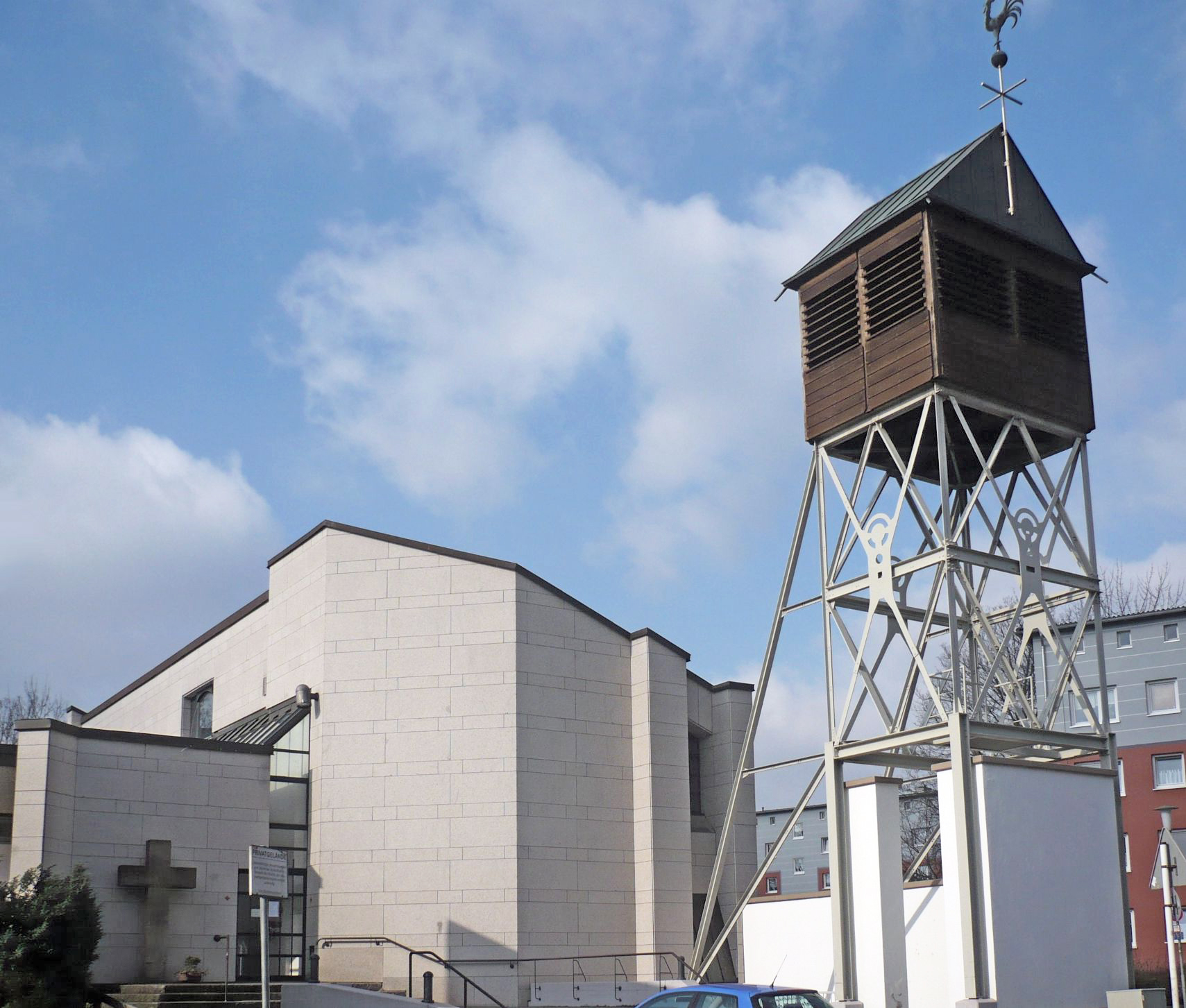 St. Altfriedkirche in Essen-Freisenbruch